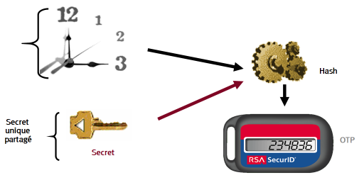 OTP Token basé sur le temps UTC